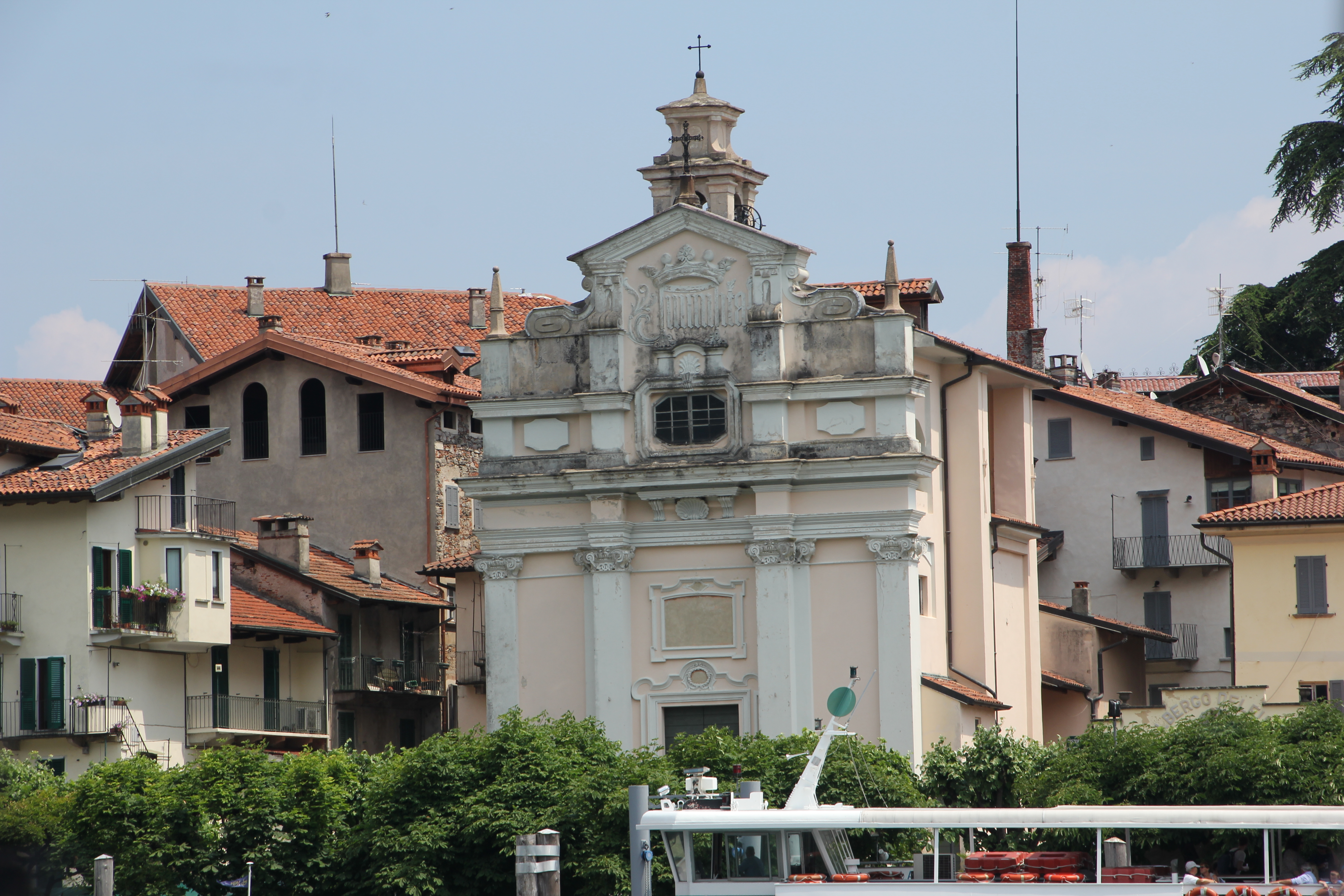 Stresa, isola Bella, chiesa di San Vittore